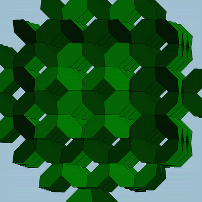 Polyèdre oblique à quatre hexagone